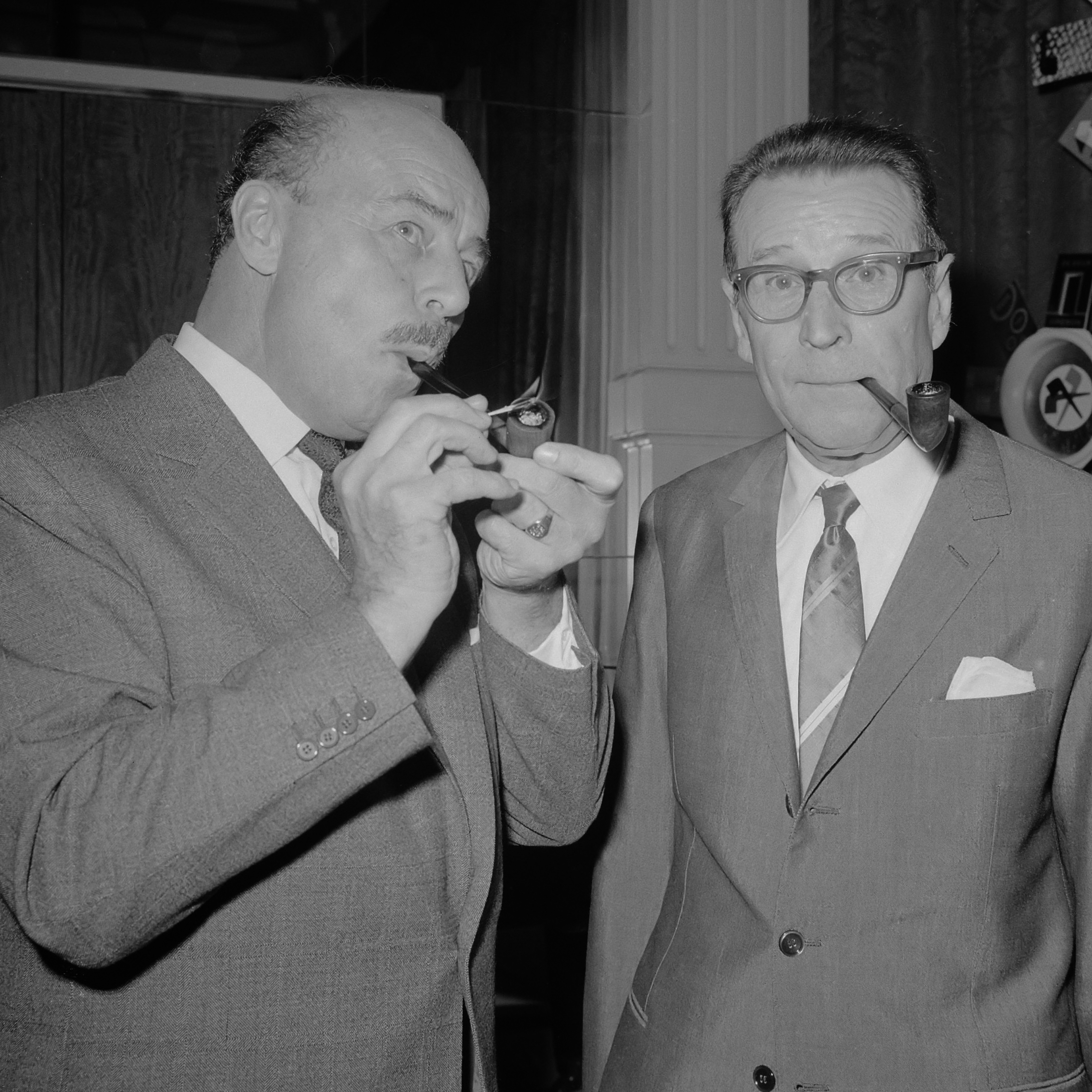 Georges Simenon samen met de acteur Jan Teulings (links) bij het beeldje van Maigret in het Amstelhotel 2 september 1966